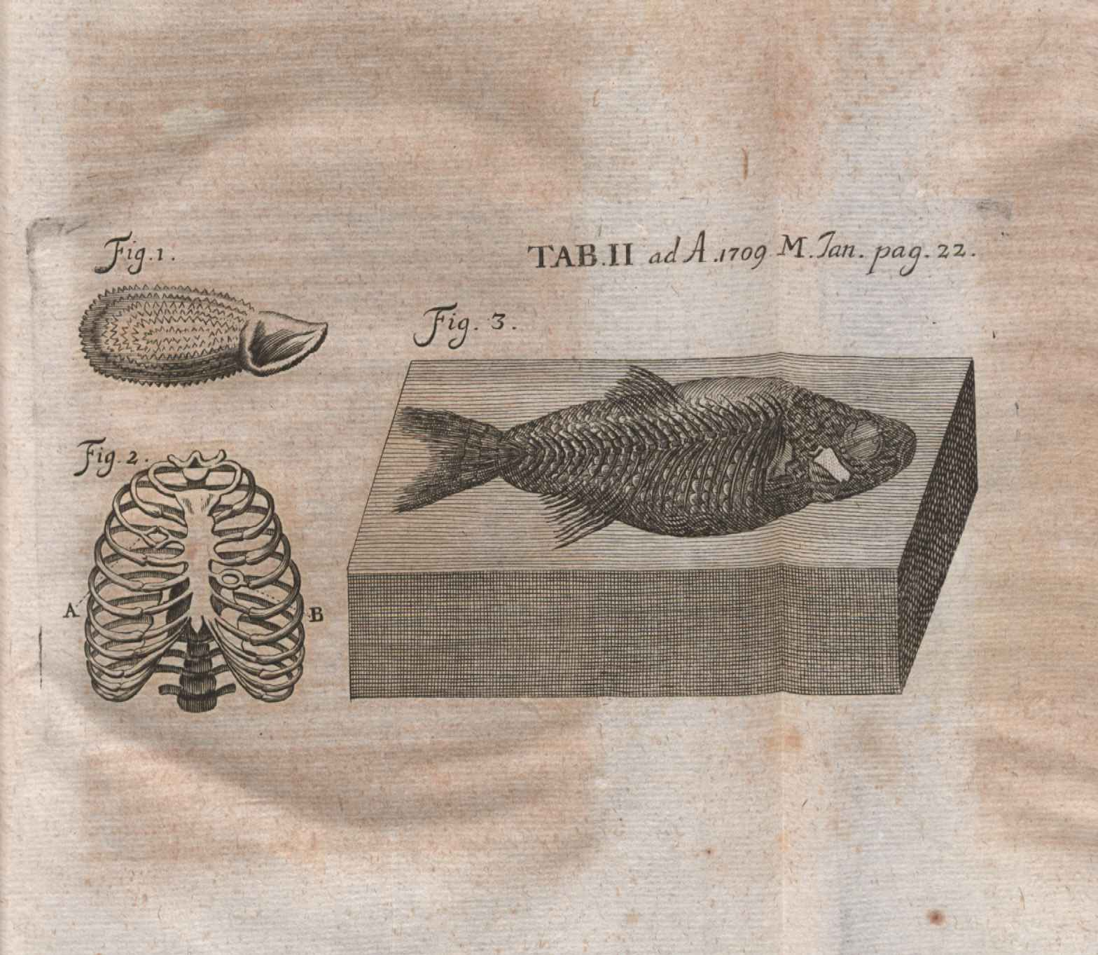 Illustration